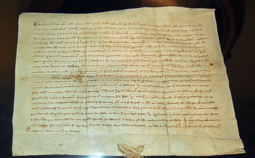 Vidimierungsurkunde des Erzbischofs Giselbert von Bremen. In dieser bestätigt er, dass er die Schenkungsurkunde aus dem Jahr 1234 von Ritter Heinrich II. von Barmstede zur Gründung des Klosters Uetersen persönlich gesehen hat. Urkunde aus dem Jahre 1300, lateinisch abgefasst. Fotografiert im Museum Langes Tannen in Uetersen.